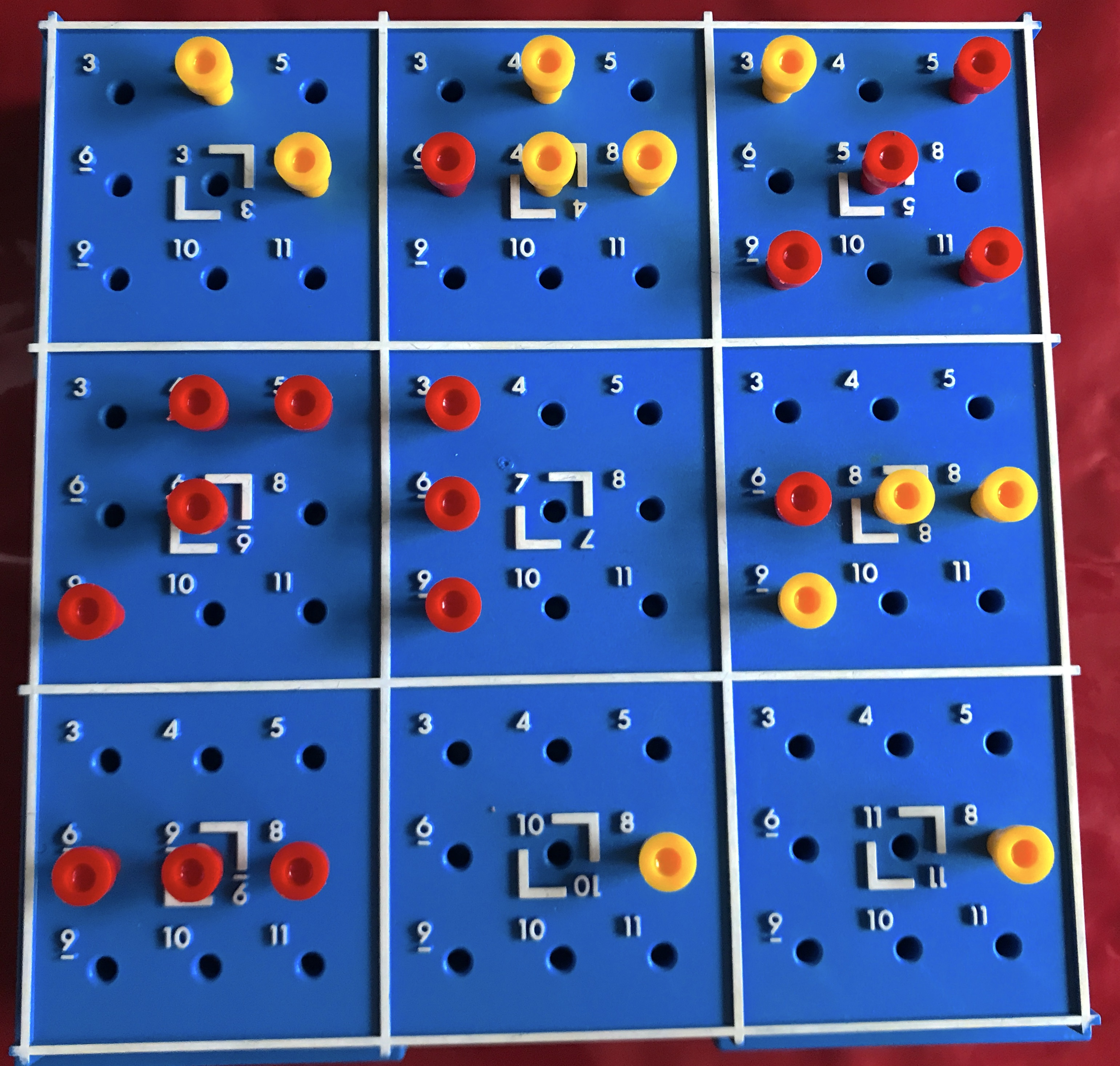 Super 3, MB Spiele 1978